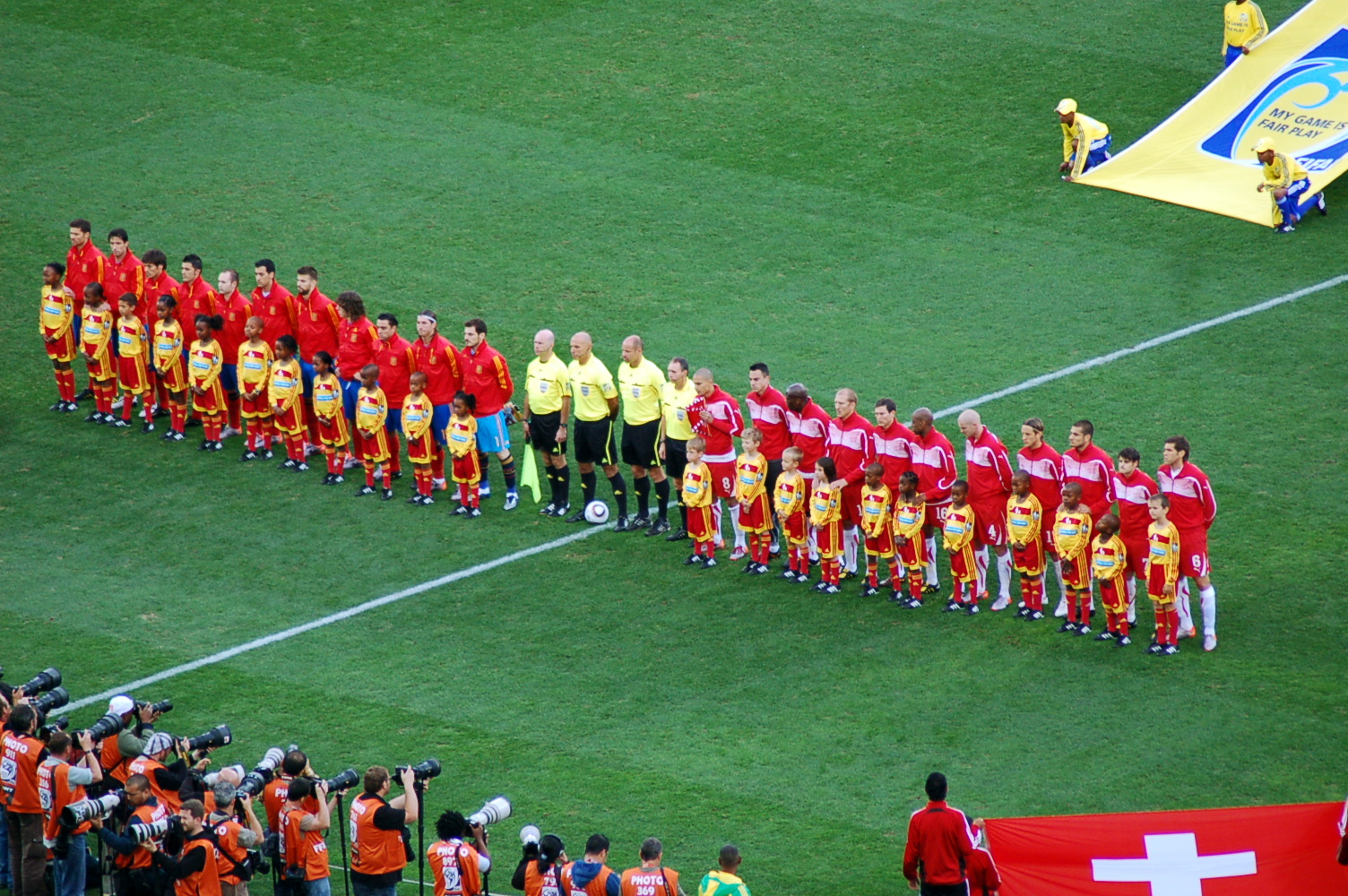 Los equipos de España y Suiza, antes del encuentro correspondiente a la Copa Mundial de la FIFA de 2010